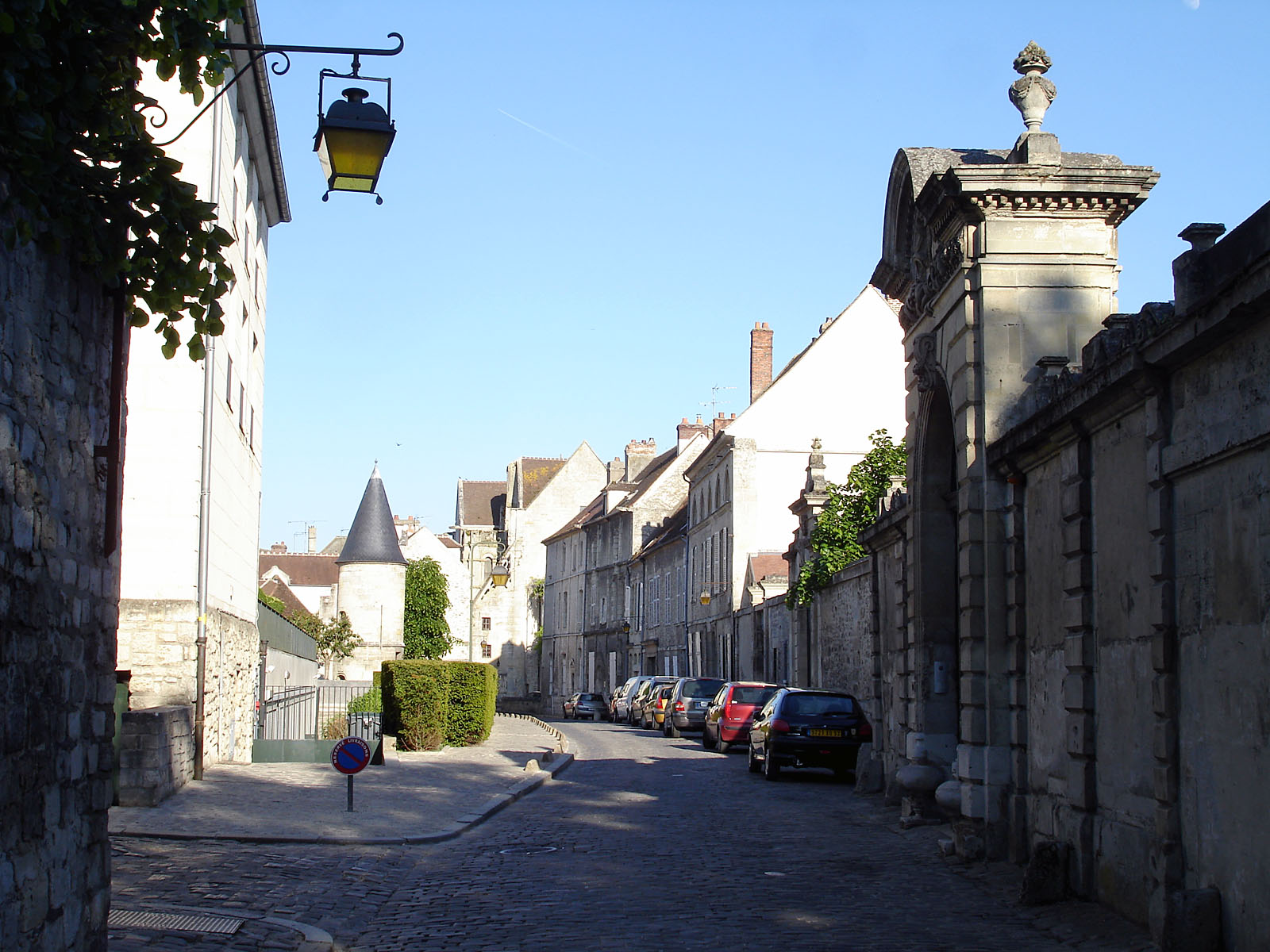 La rue de Beauvais à Senlis, Oise, France.